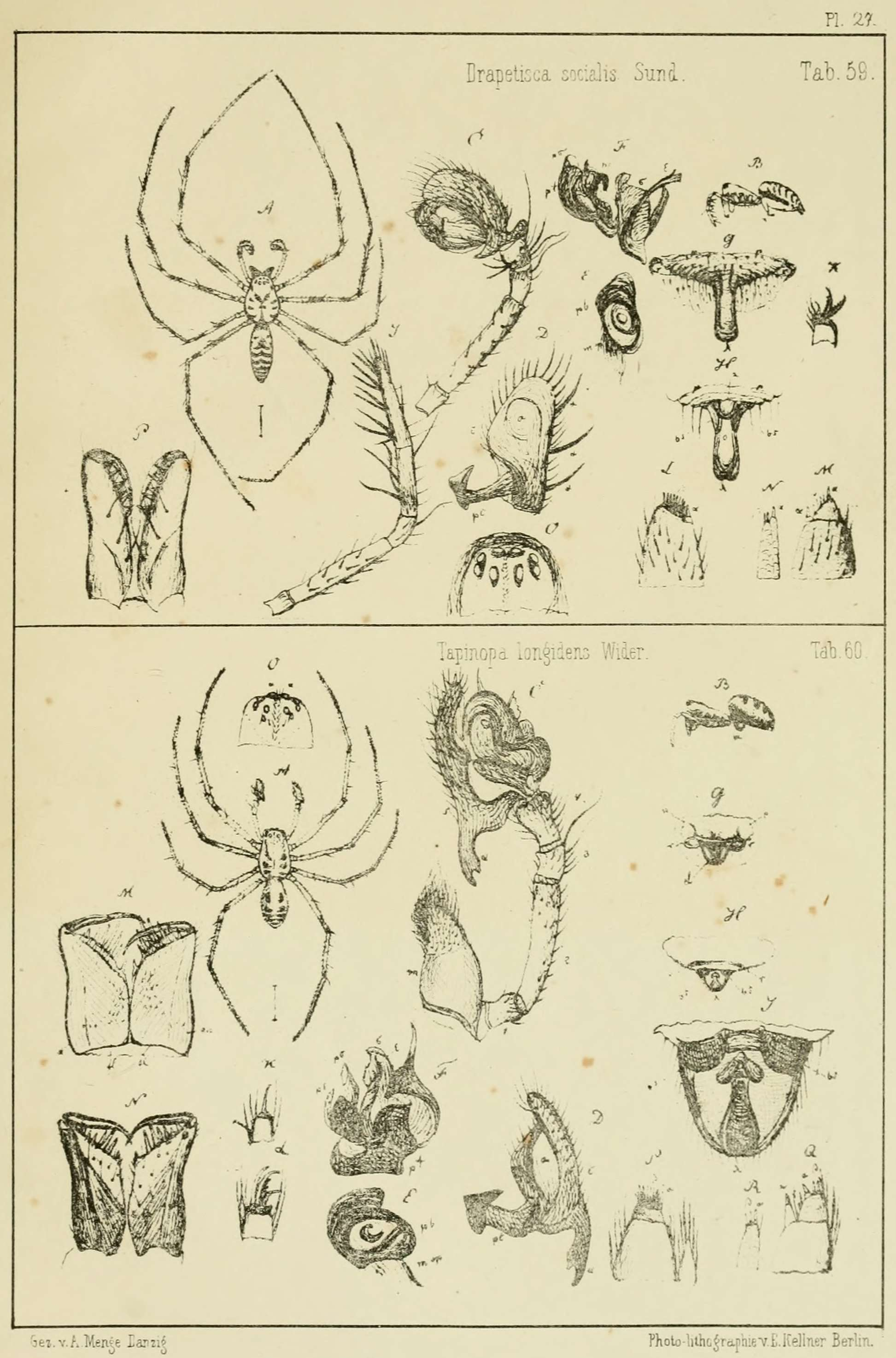 Anton Menge: Preussische Spinnen. I. Abtheilung. Tafel 27 - 59. Drapetisca socialis Sund. 60. Tapinopa longidens Wider.. In: Schriften der Naturforschenden Gesellschaft in Danzig. Erster Band drittes und viertes Heft. Druck von A. W. Kafemann, Danzig 1866